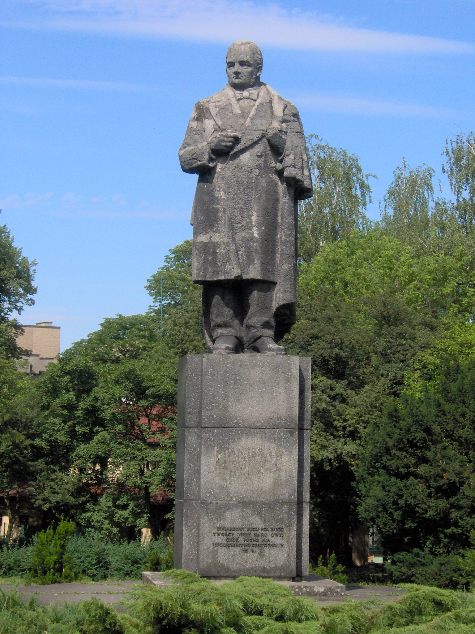 Stanisław Moniuszko - pomnik w Częstochowie.